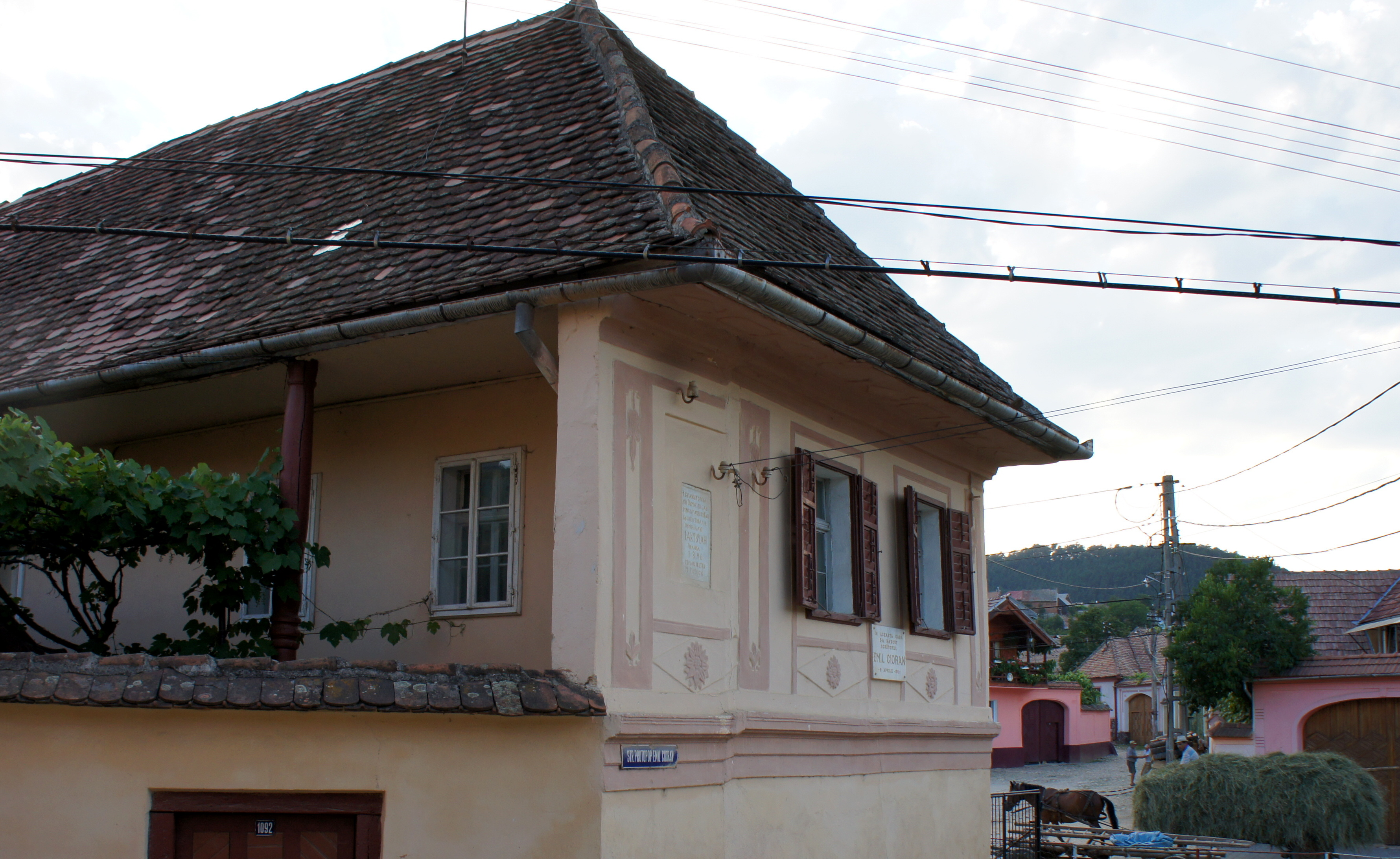 avant le départ...